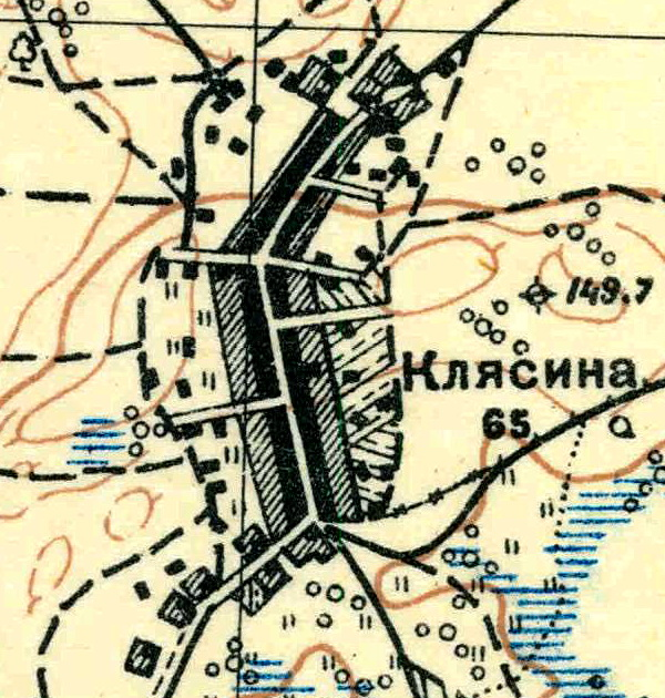 Топографическая карта Ленинградской области, квадрат О-35-24-А-а (Клясина), деревня Клясино